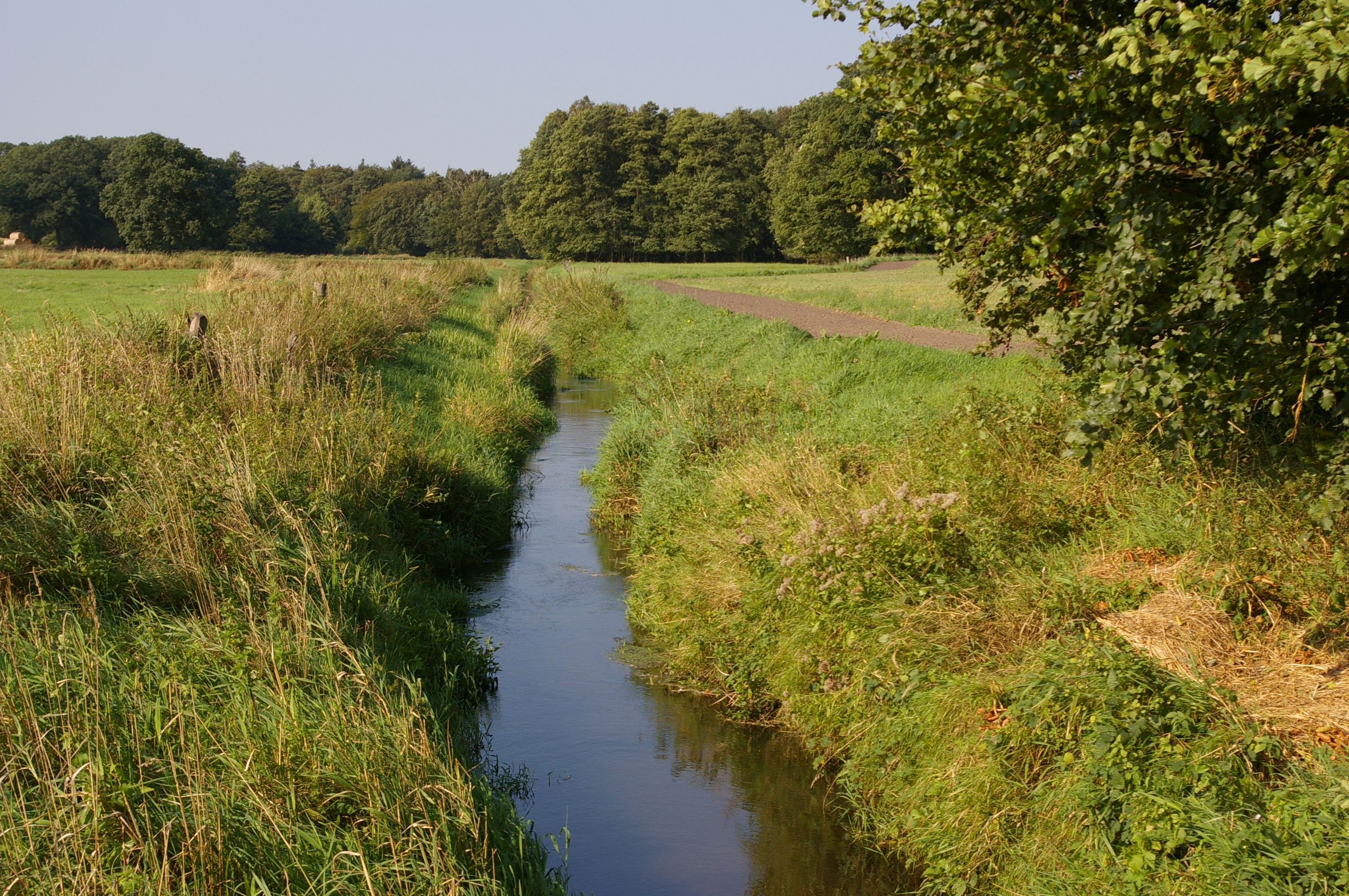 Der Päpser Bach bei Päpsen